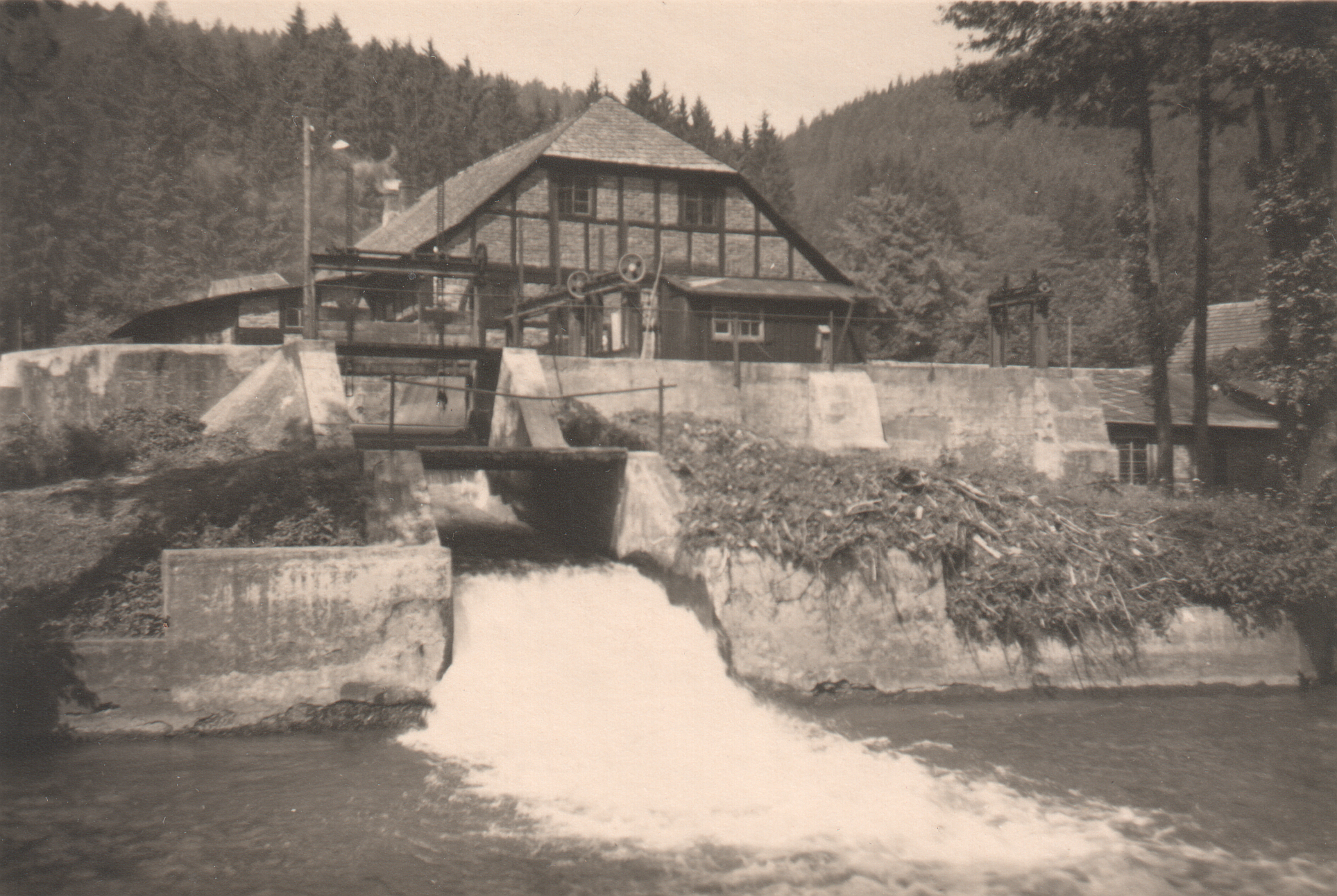 Mankenbach Unterweißbach, Mühle